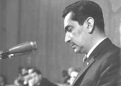 Raúl Ampuero Díaz, co-fundador del Partido Socialista Popular